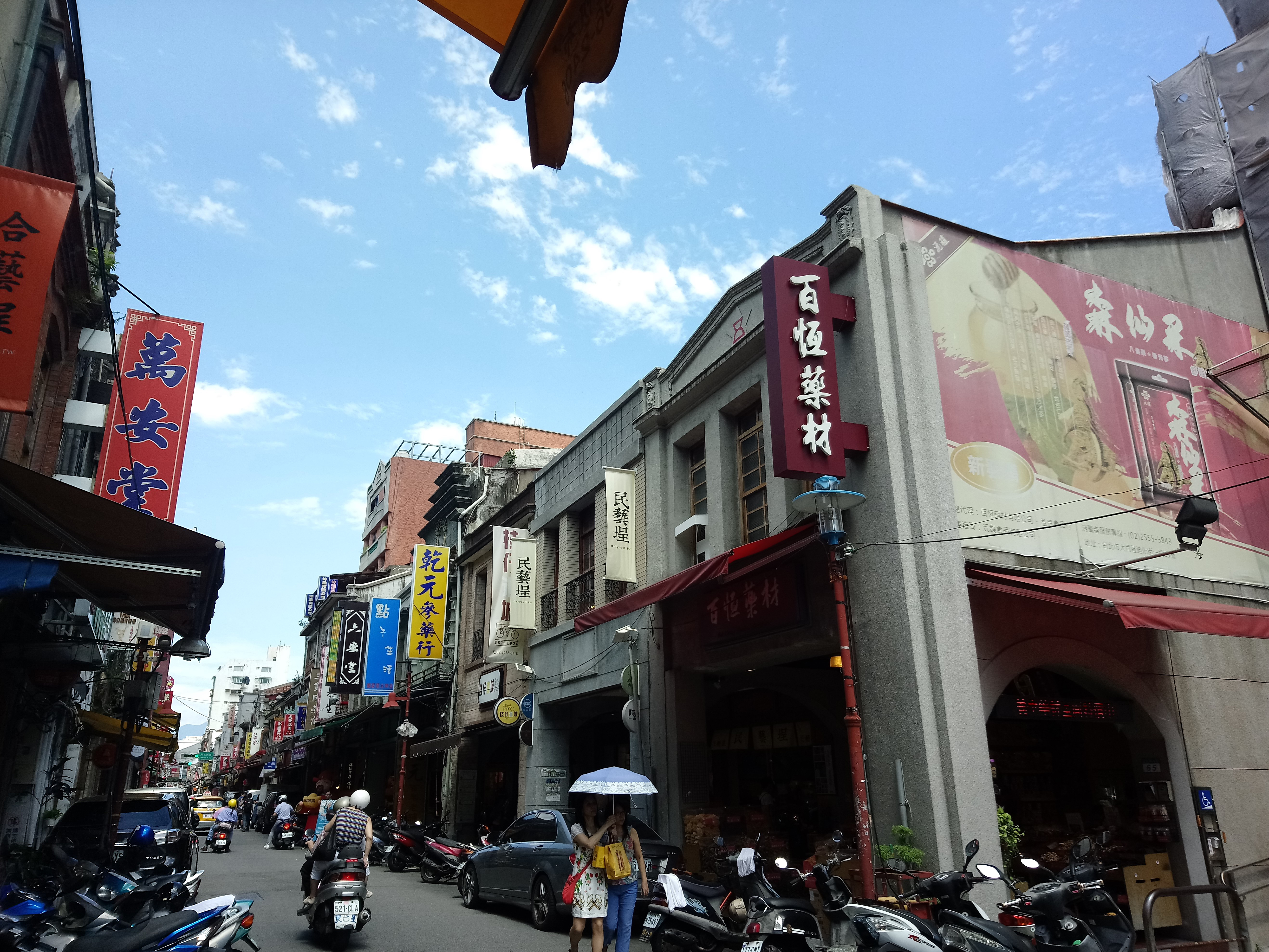 迪化街南街,台北市大同區延平次分區永樂里